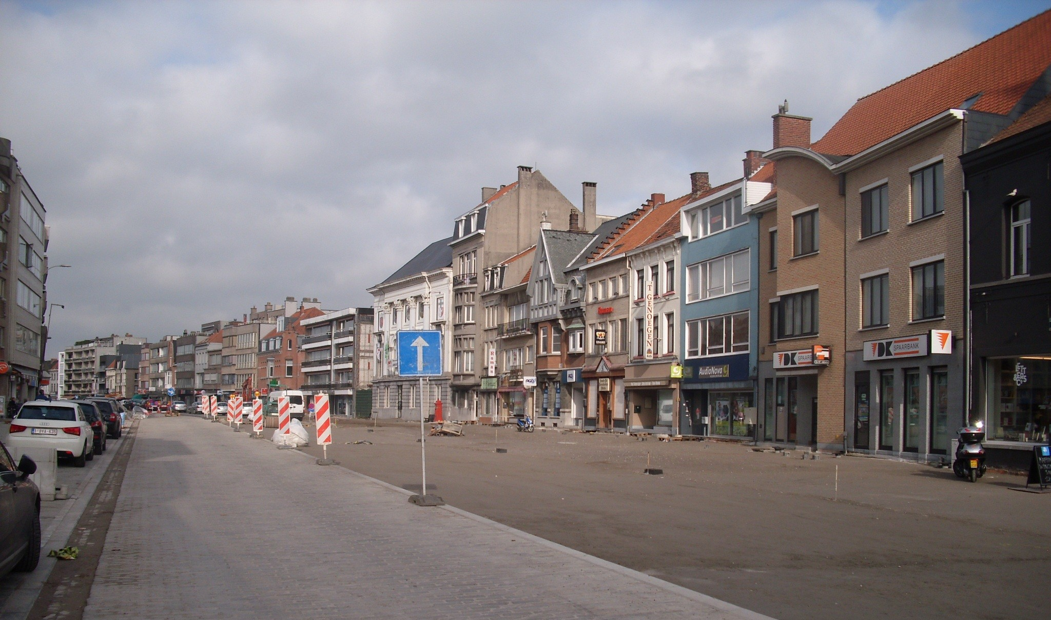 De Markt van Deinze tijdens de heraanleg in 2011 - Deinze - Oost-Vlaanderen - België